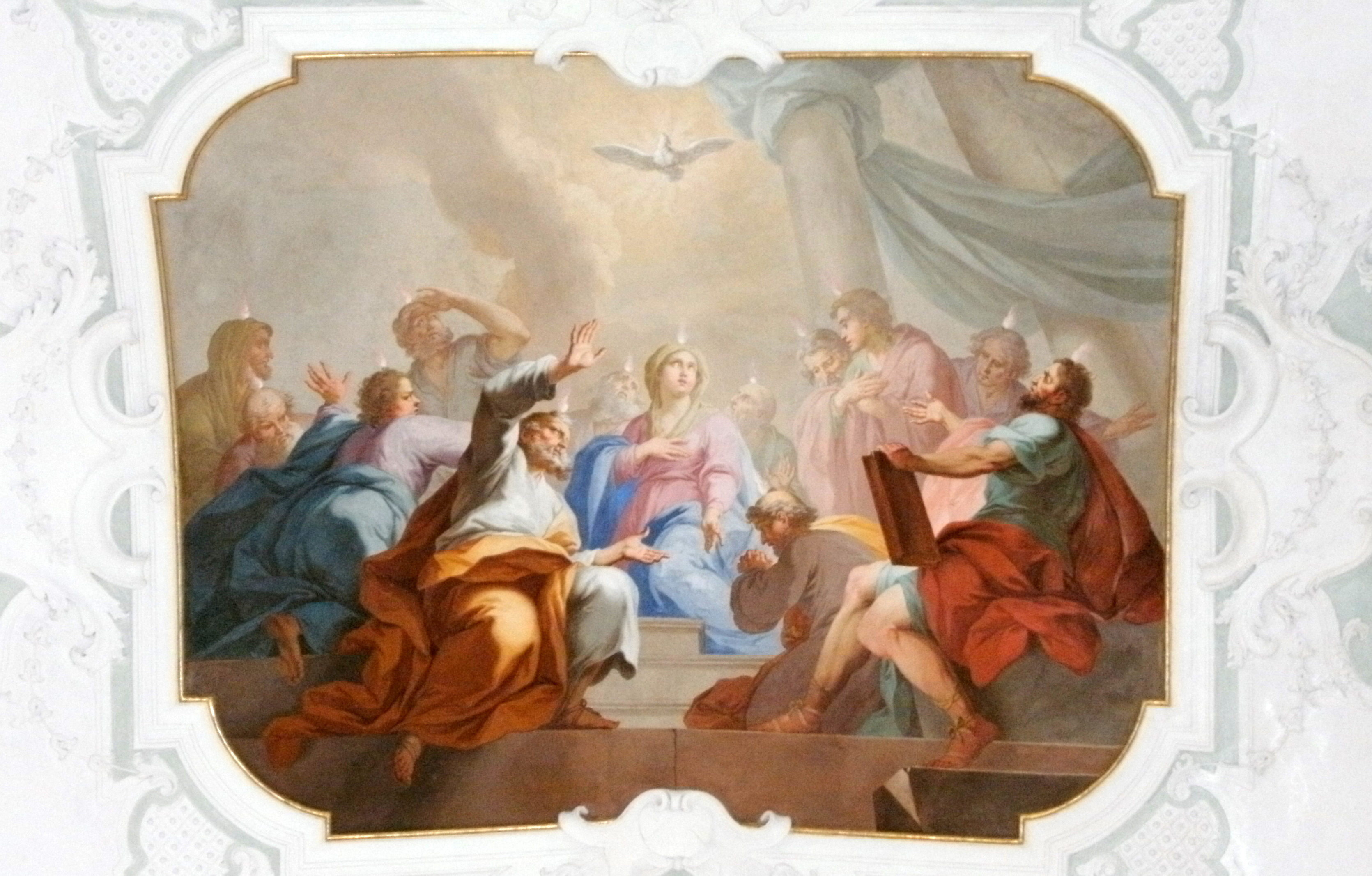 Zwölf Glaubensartikel